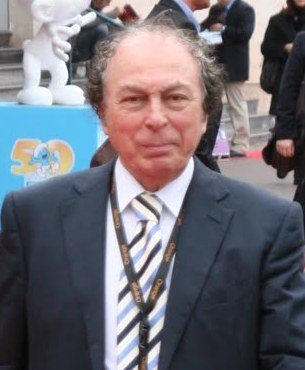 Valeriu Lazarov and Augusta Lazarov